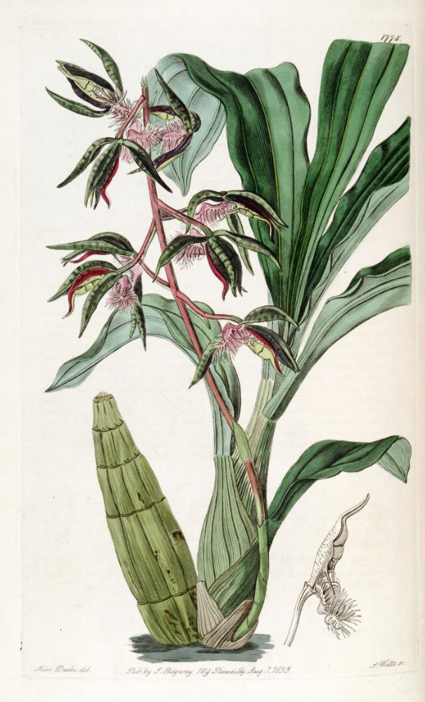 Catasetum barbatum (as syn. Myanthus barbatus)